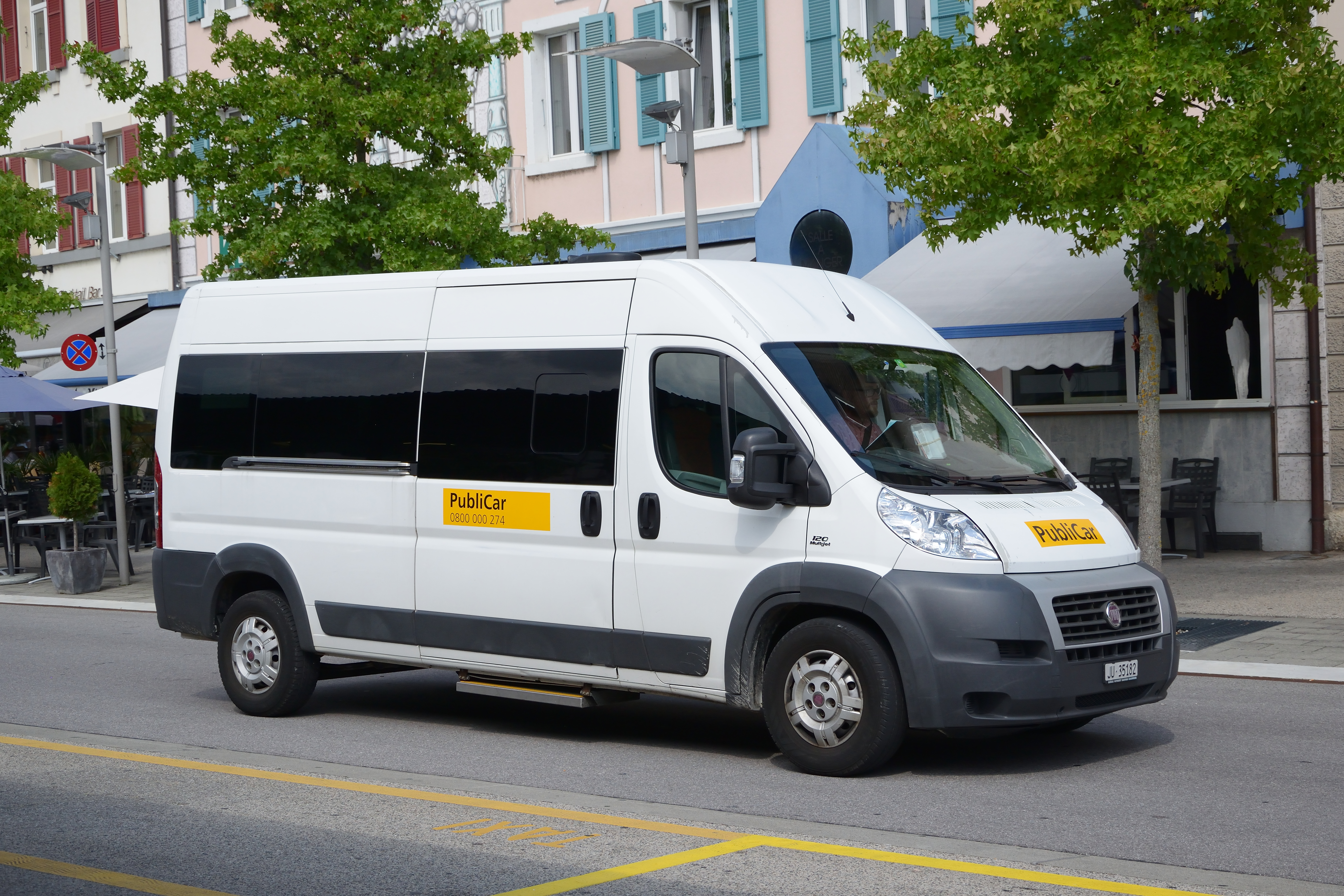 Un minibus du service à la demande Publi Car à Delémont (JU)